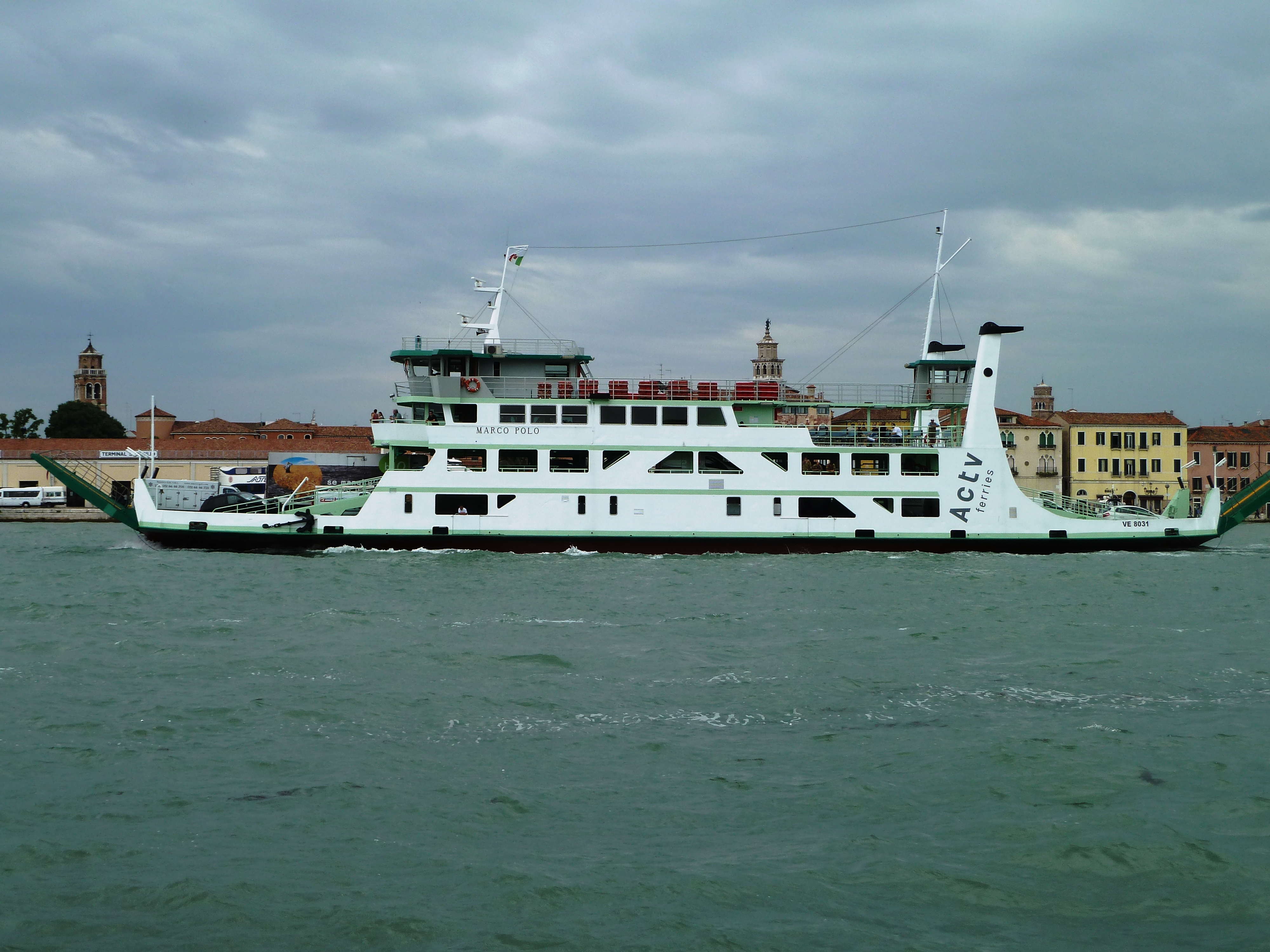 Car ferry in Venice